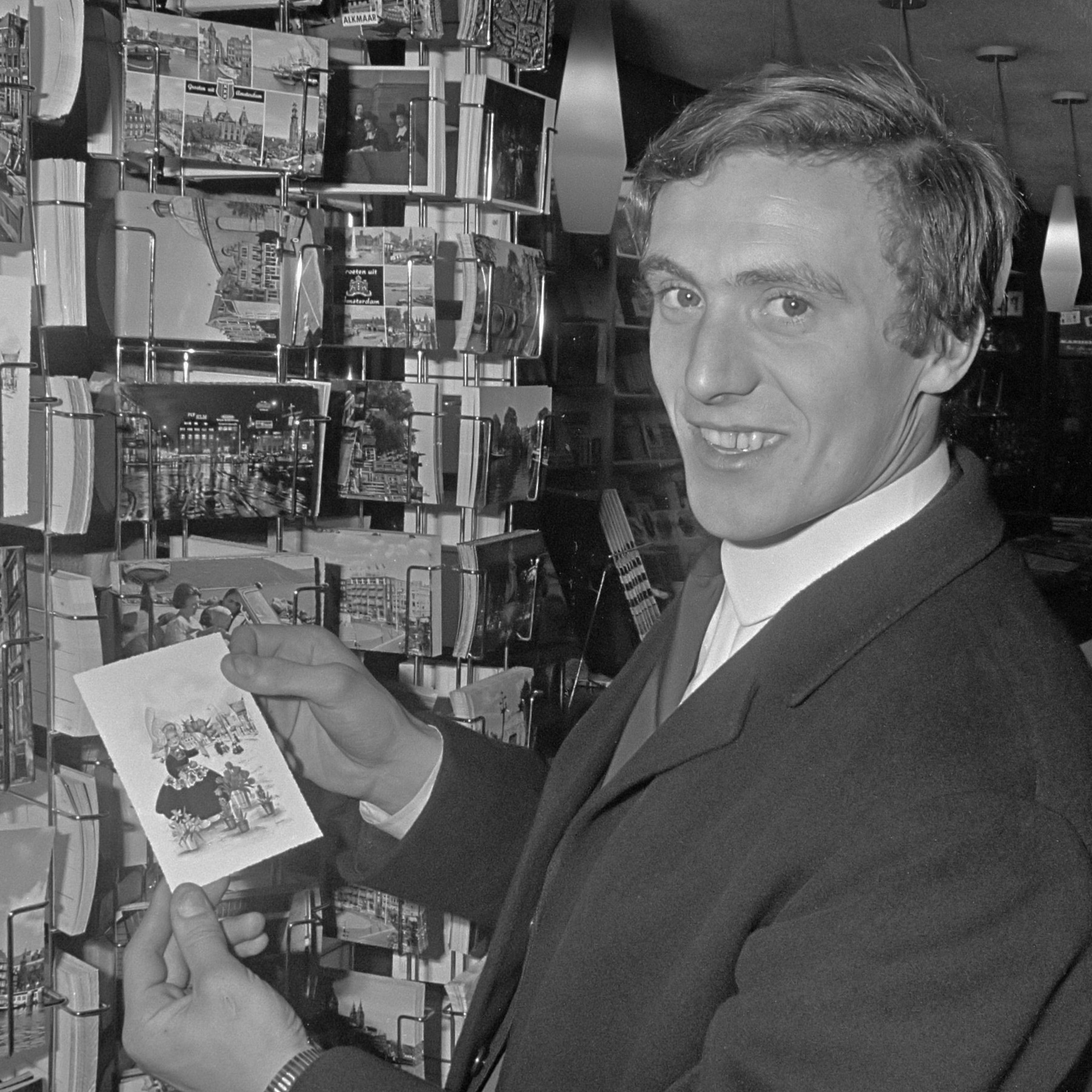 Glasgow Rangers in Hiltonhotel te Amsterdam Stein bij ansichtkaarten 14 januari 1969